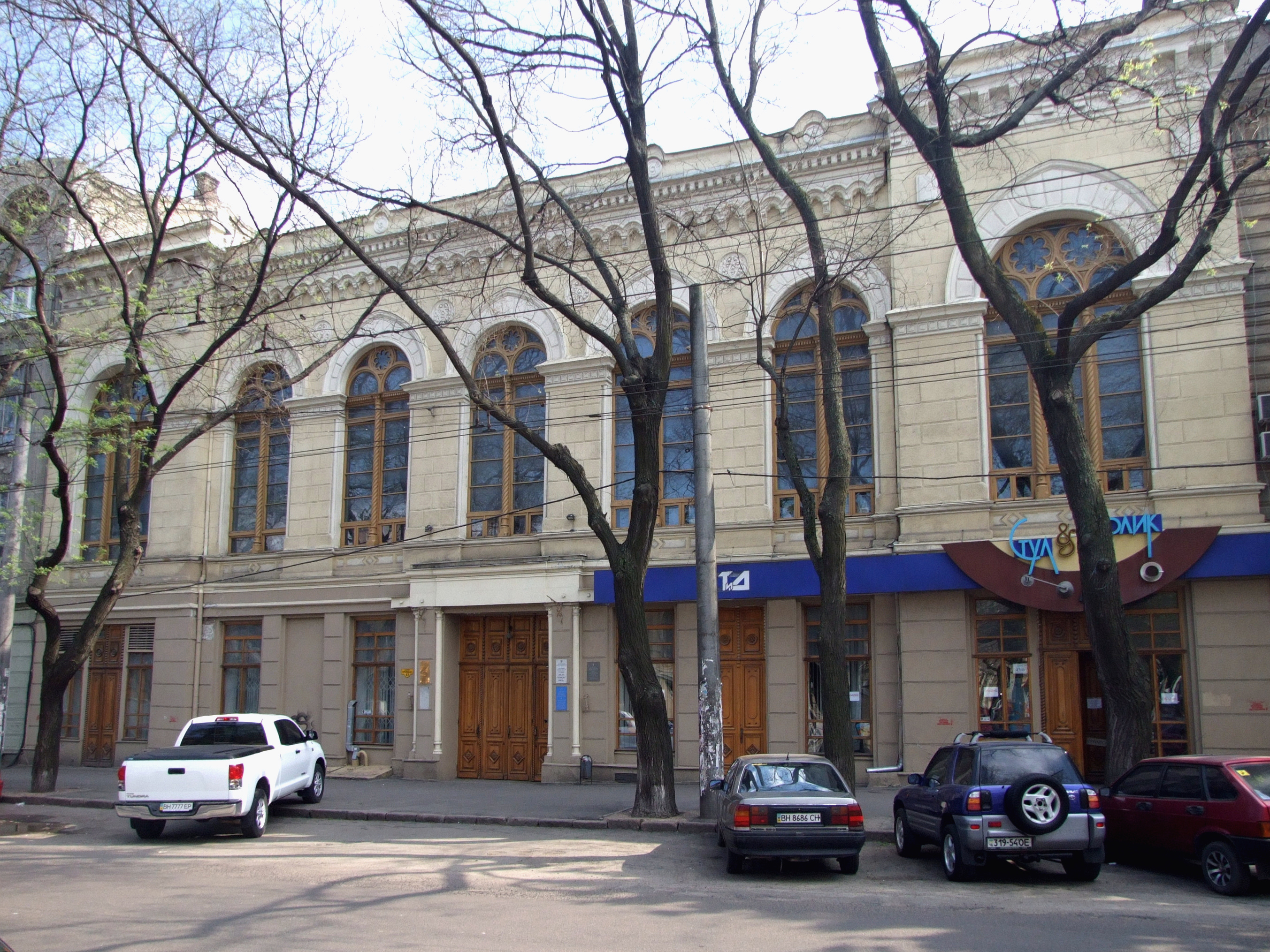 Будинок з концертним залом “Уніон” товариства взаємної допомоги прикажчиків-євреїв, арх. А.Р. Рейхенберг, Ф.А. Троупянський, 1901-1902 рр. Де 6-9 грудня 1911 р. проходили авторські концерти композитора О. Скрябіна;-19 березня 1925 р. на літературному вечері виступали поети М. Свєтлов і М. Голодний, письменник О. Югов.